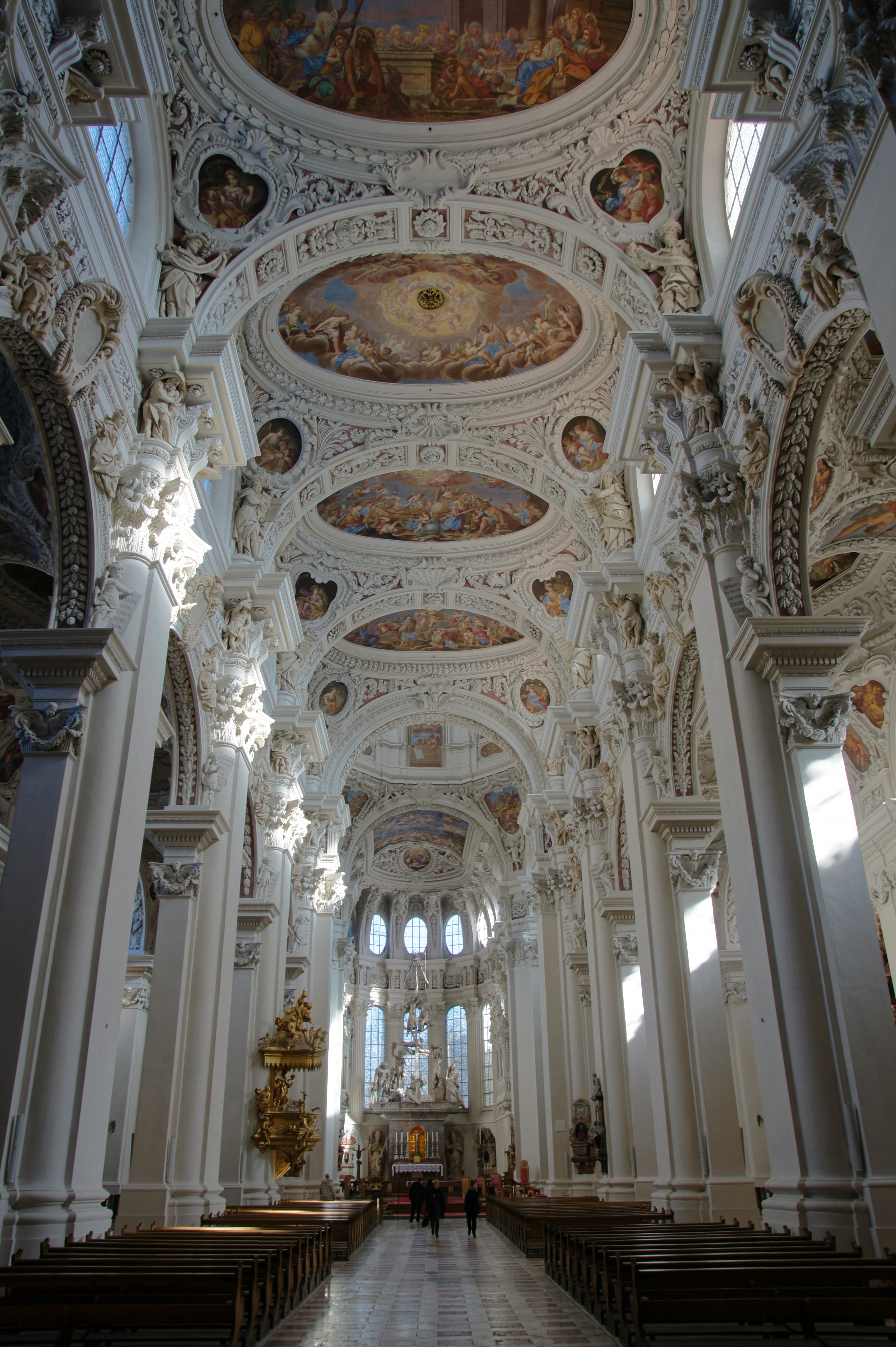 Passau 050 Dom Sankt Stephan